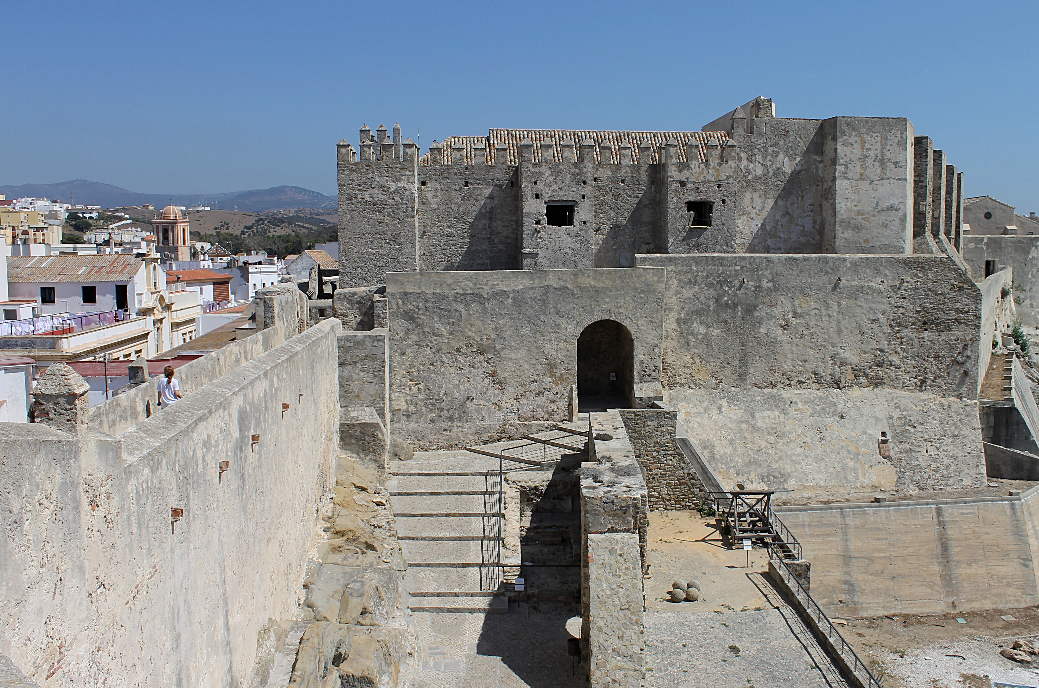 Le château fut commandé par Abd er-Rahman III, premier émir arabe à prendre le titre de calife, qui avait à coeur de contrôler le détroit de Gibraltar.